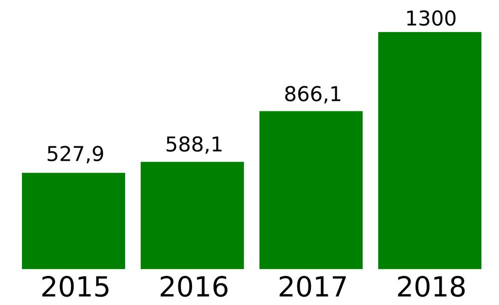 Затраты на уборку в Москве и области, в рублях по годам